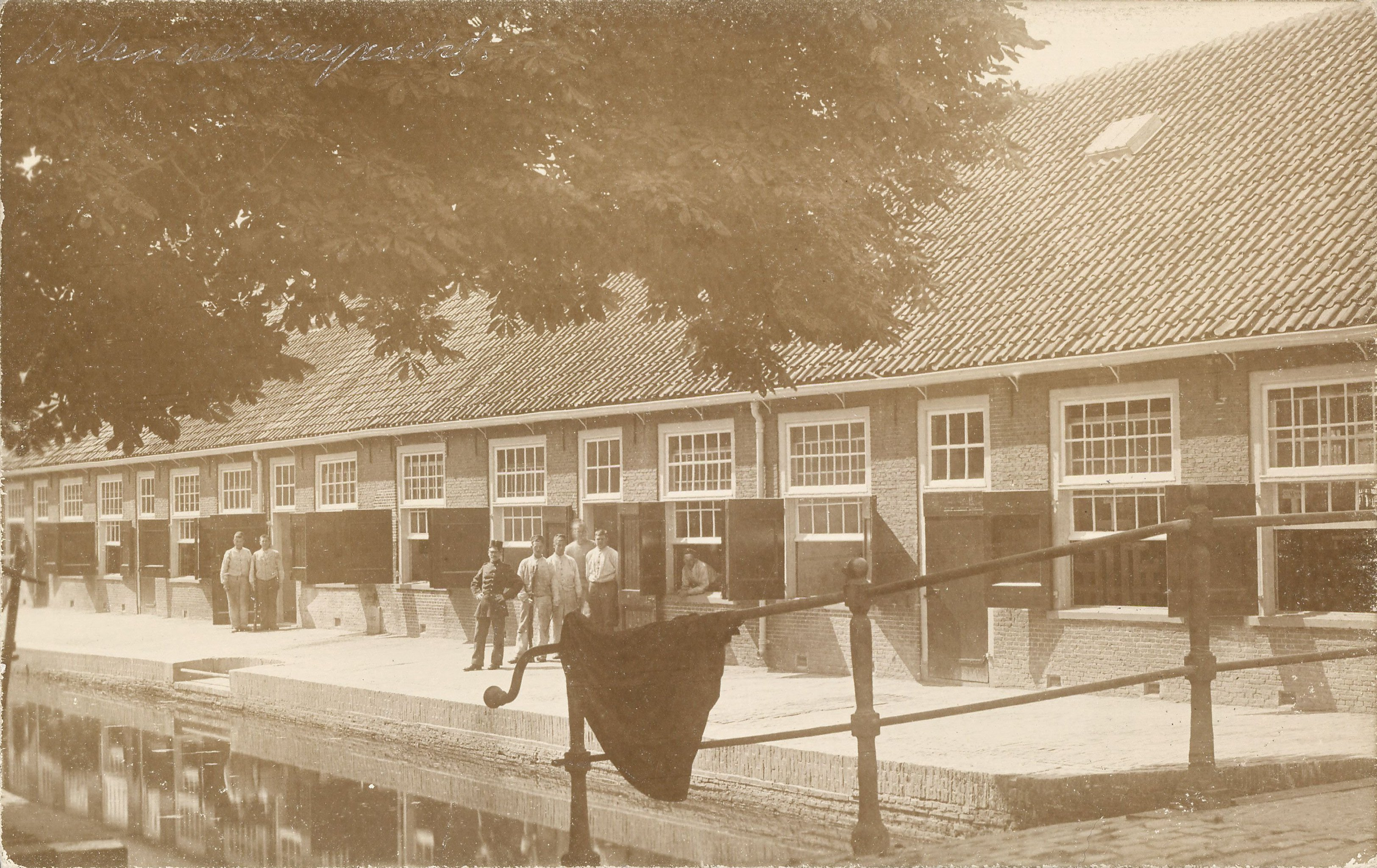 Gezicht op de kazernegebouwen langs de Doelengracht.